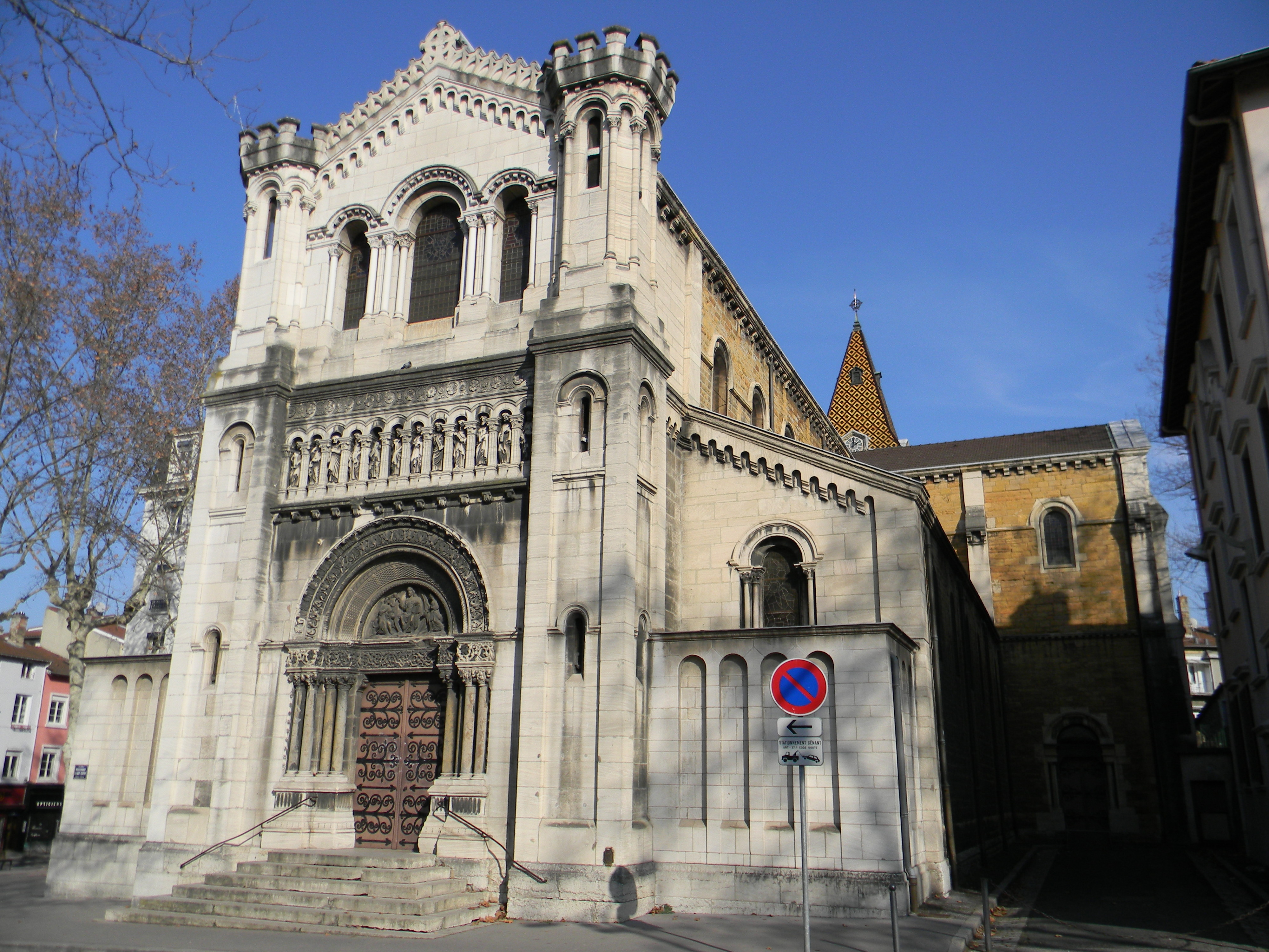 Église Saint-Pierre-de-Vaise